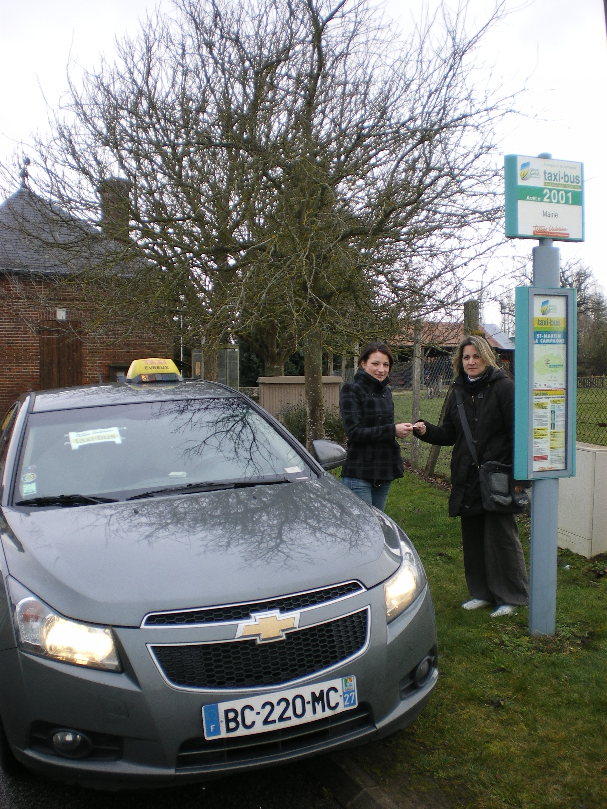 Taxi-bus